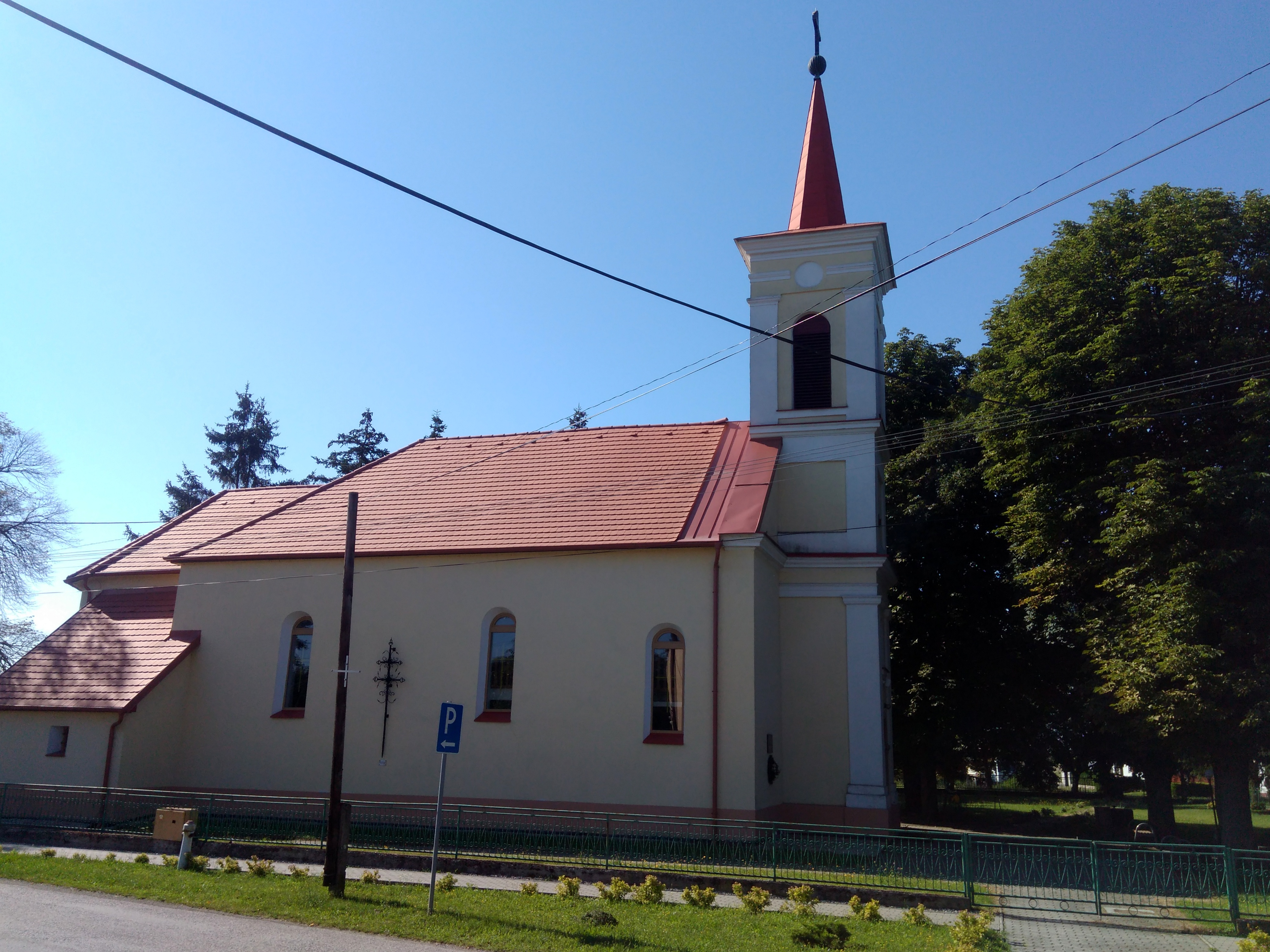 Nagykoszmály r.k. templom